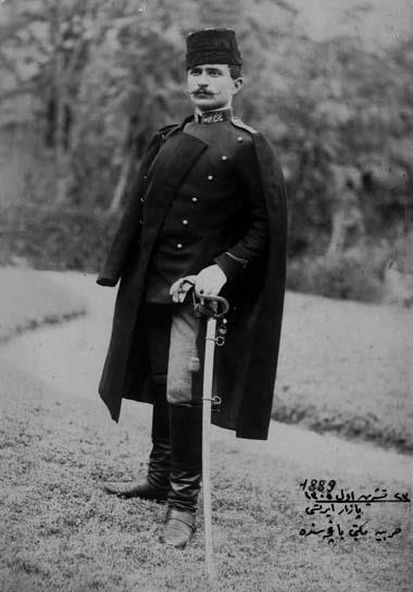 Молодой Факхри-паша. Подпись на фотографии датирована 1889 годом.